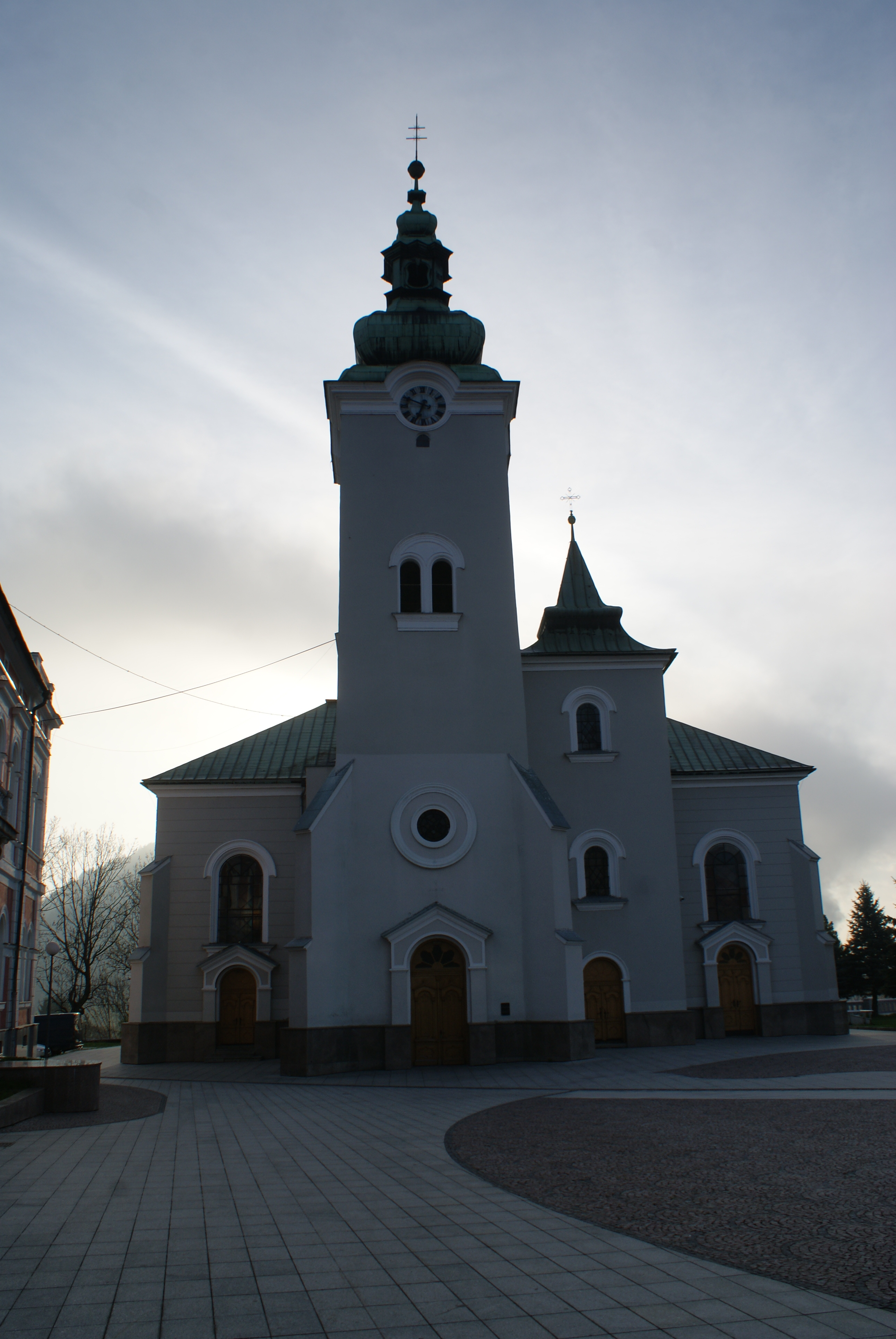 Ружомберок